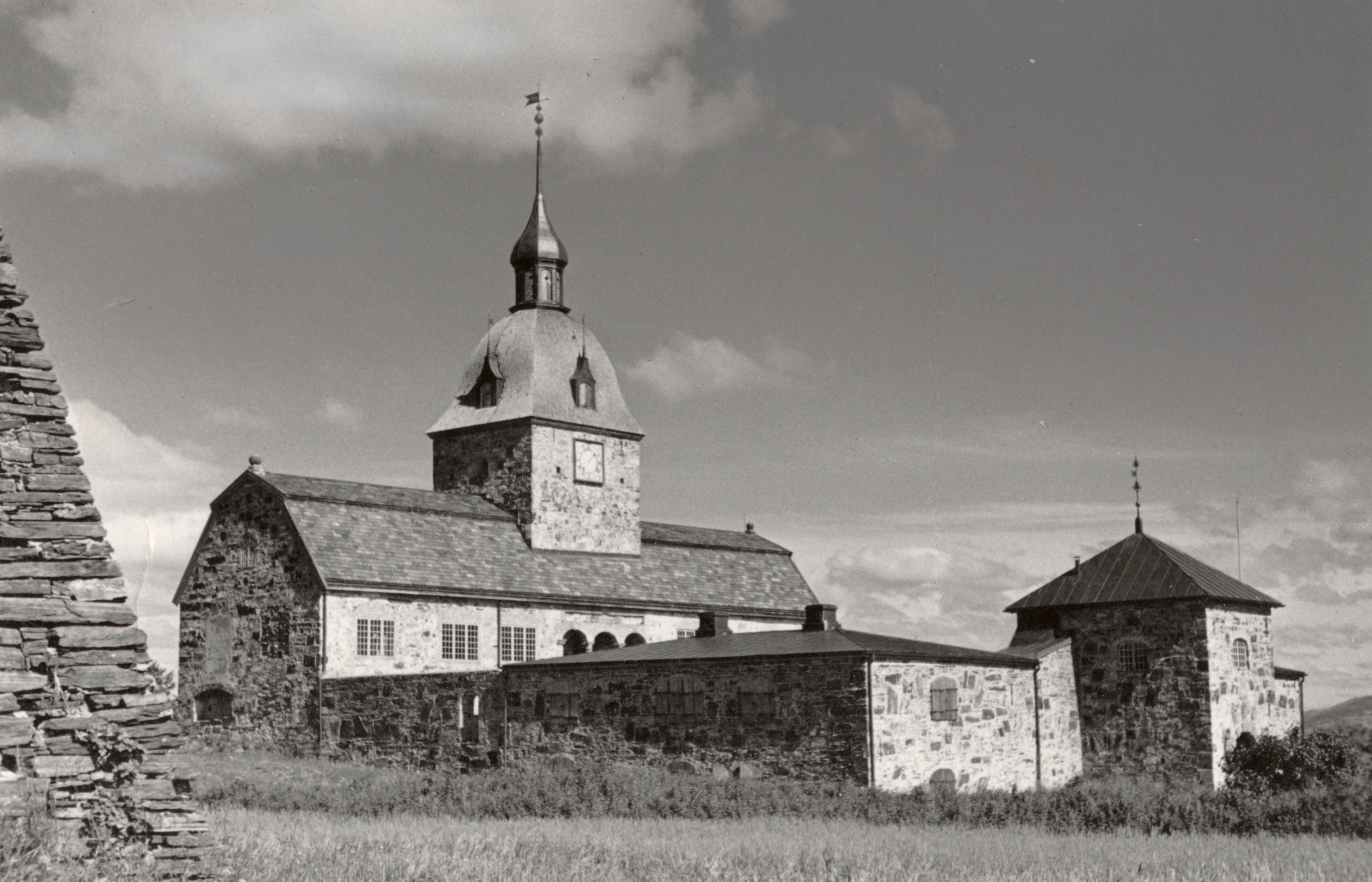 Austråt (Østeråt) i Ørland, Sør-Trøndelag This image on crowdsourcing geotagging platform Fotodugnad